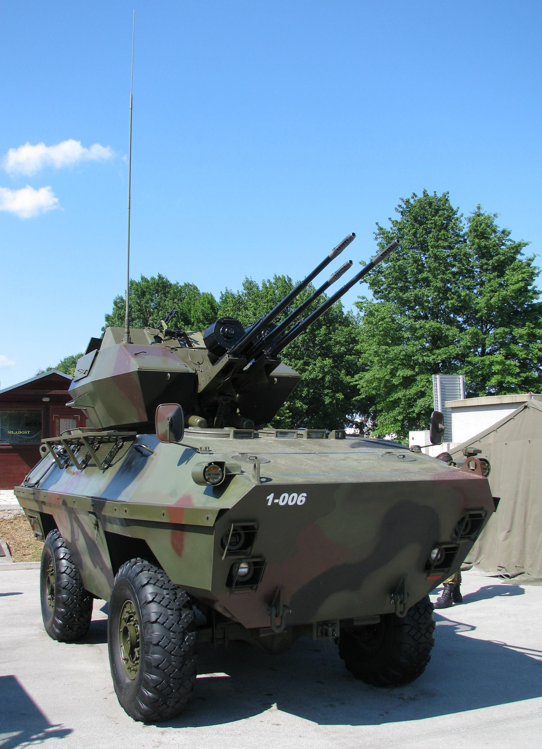 Samovozni protuzrakoplovni top 20/3mm